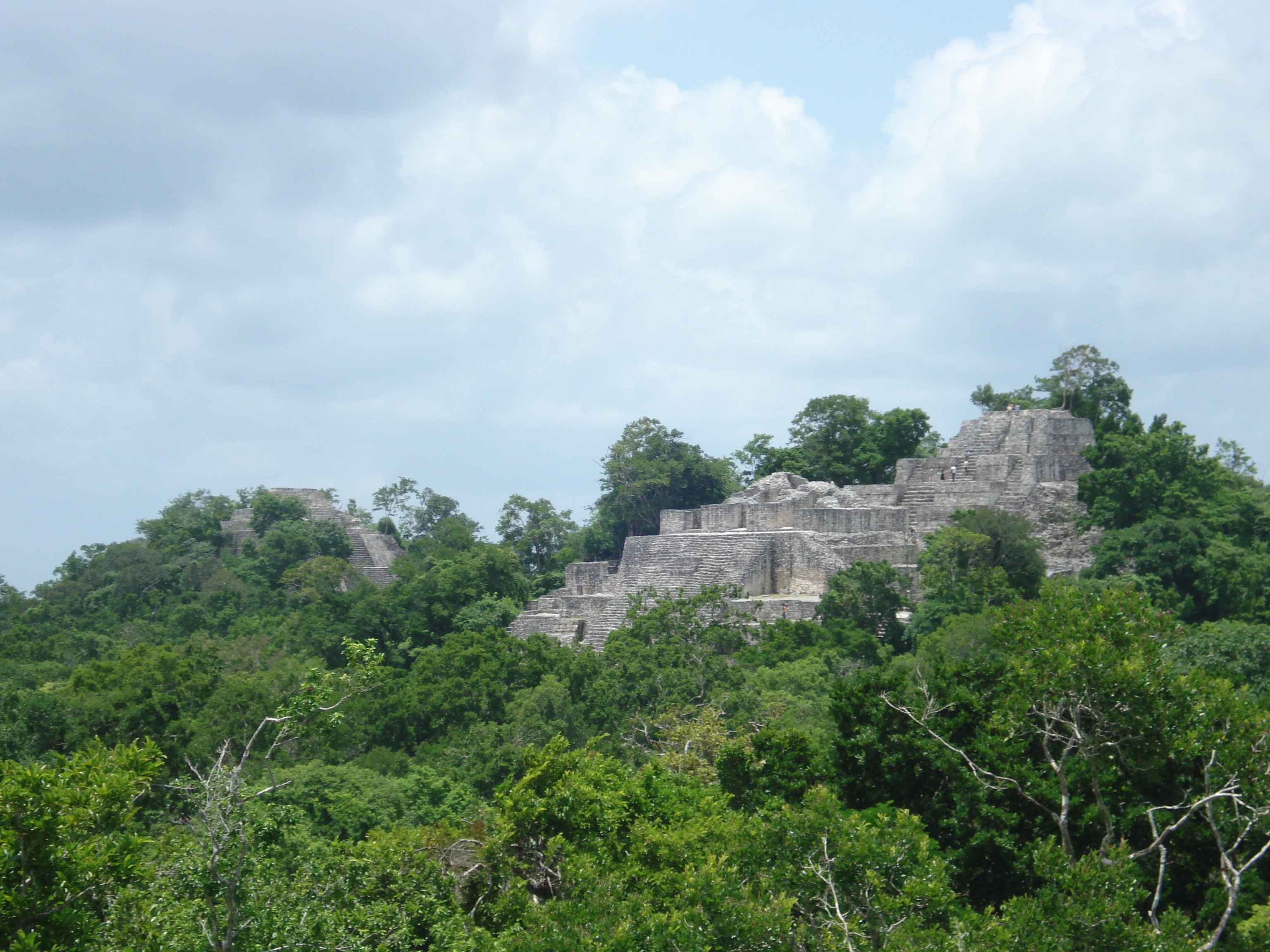 unesco werelderfgoed calakmul mexico maya tempel